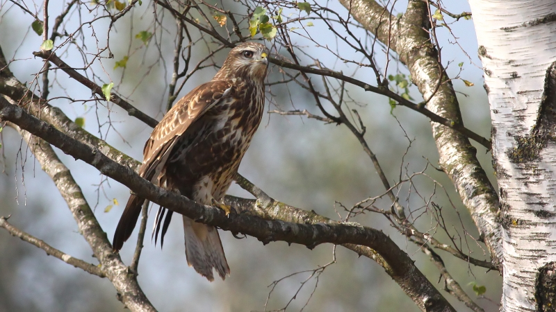 Buzzard (Buteo buteo)